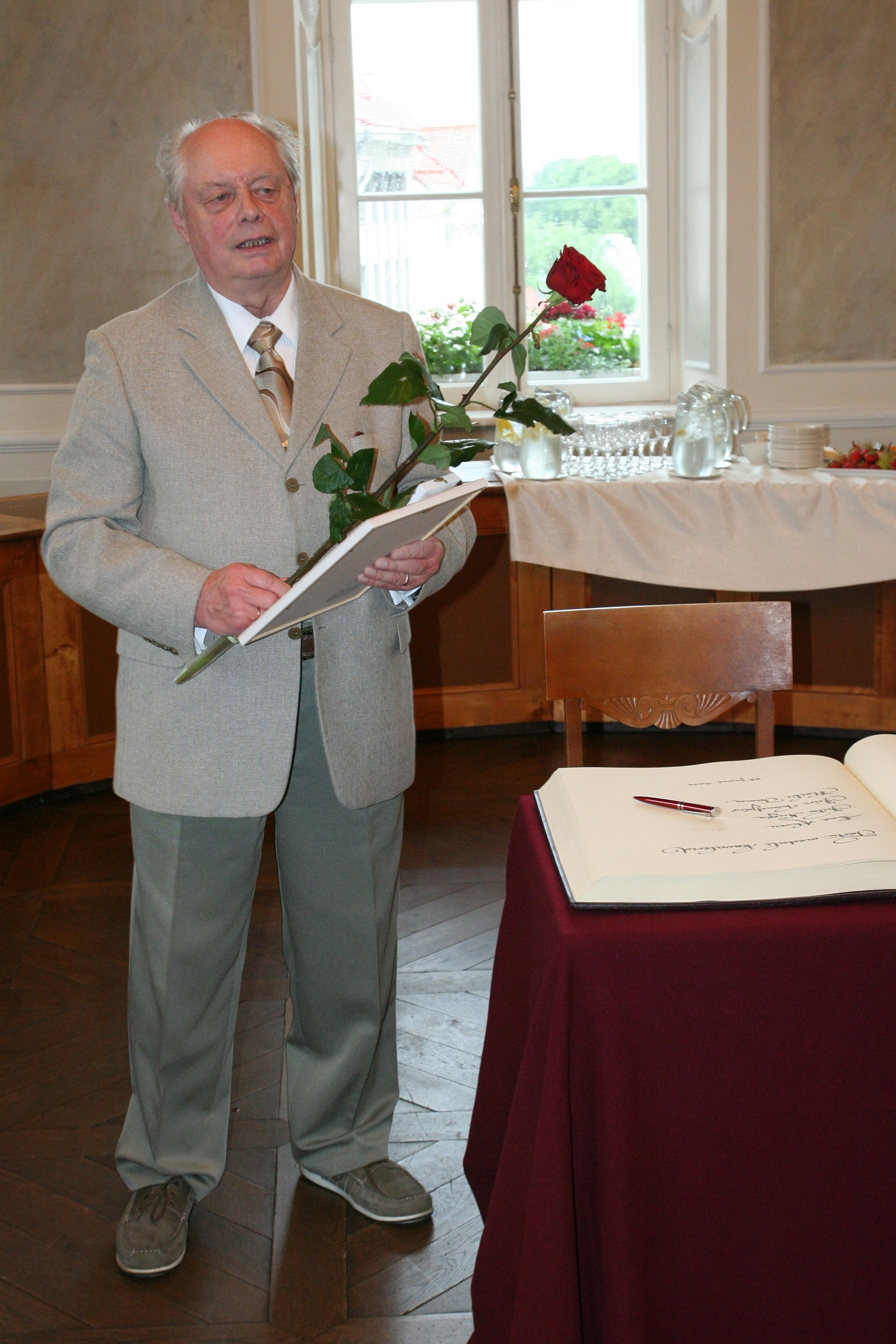 Jüri Randjärv, Eesti Maaülikooli geodeesia emeriitprofessor, Tartu medalite üleandmisel 29. juunil 2014